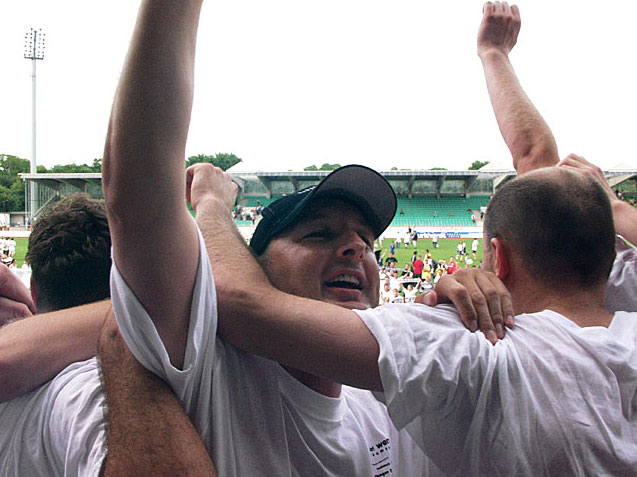 after relegation game ssv - lynx, ulm, donaustadion, june 2002